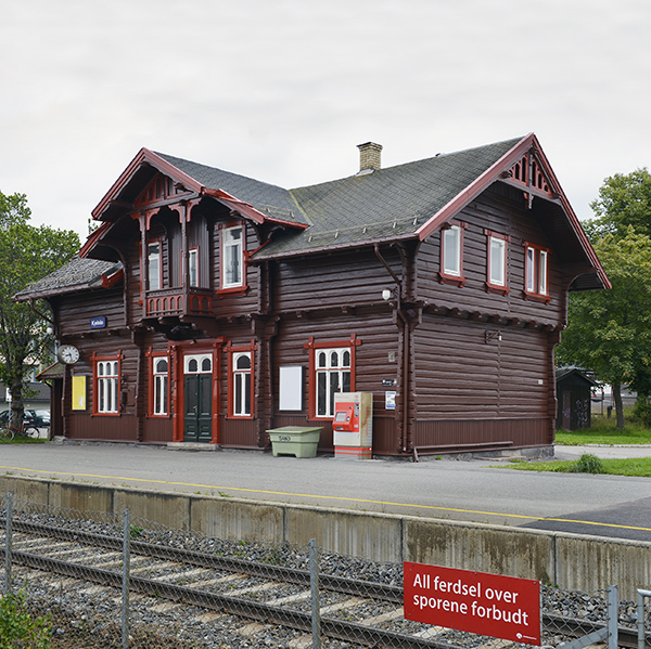 Telemuseets administrasjon ligger i den gamle fredede stasjonsbygningen på Kjelsås i Oslo.